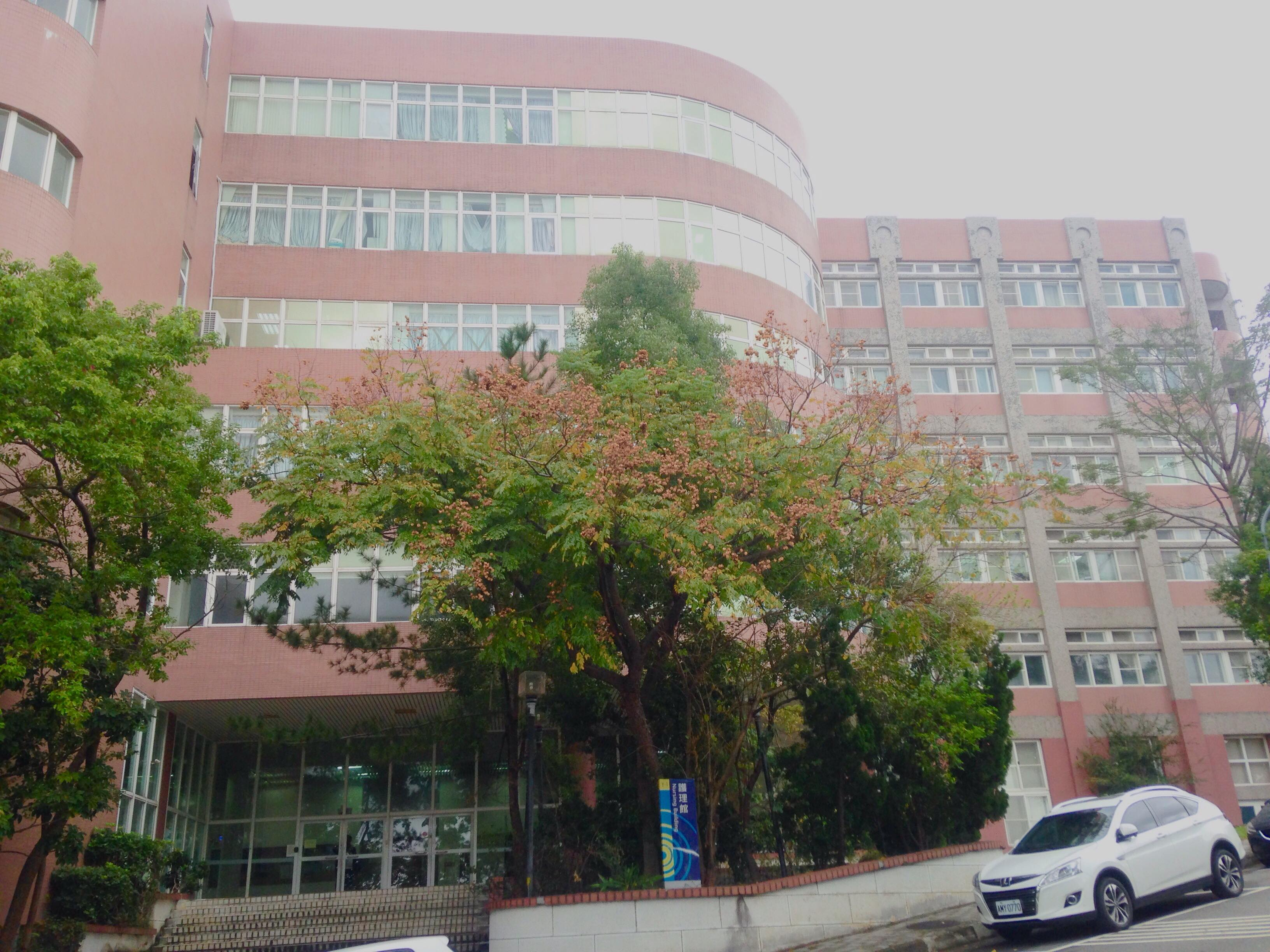 國立陽明大學護理館